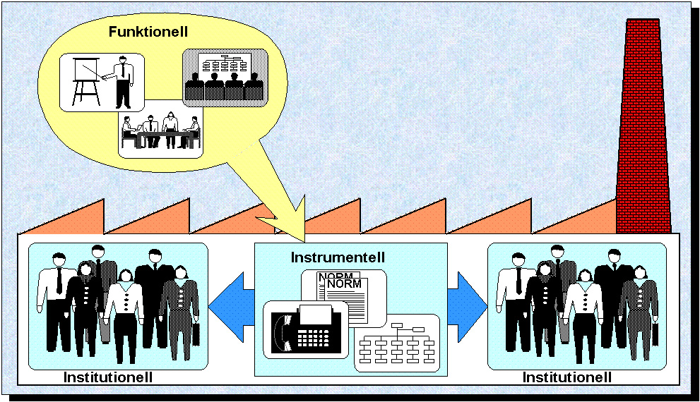 Zusammenhang der Organisationsbegriffe